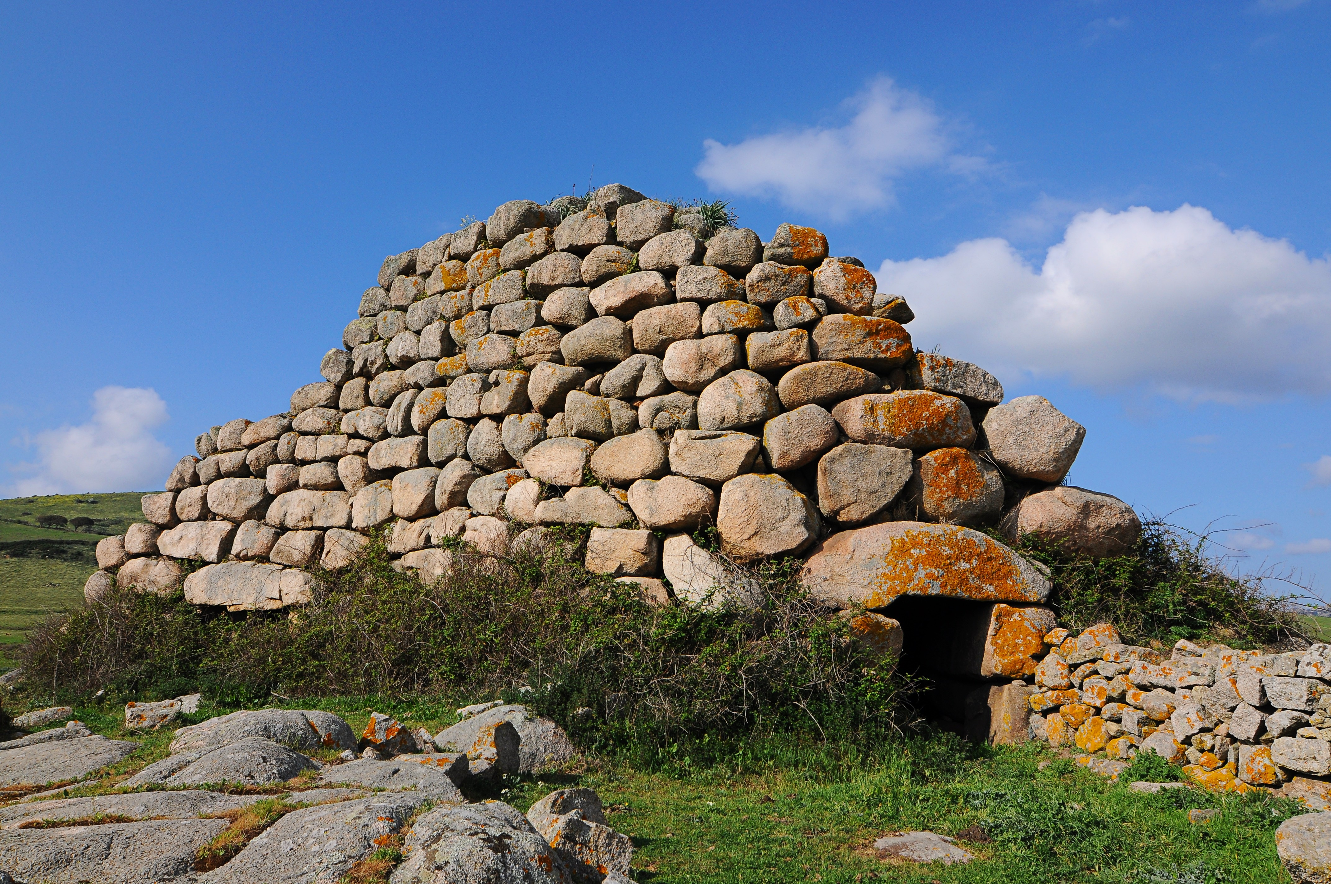 December 18, 2012 - Il nuraghe Izzana